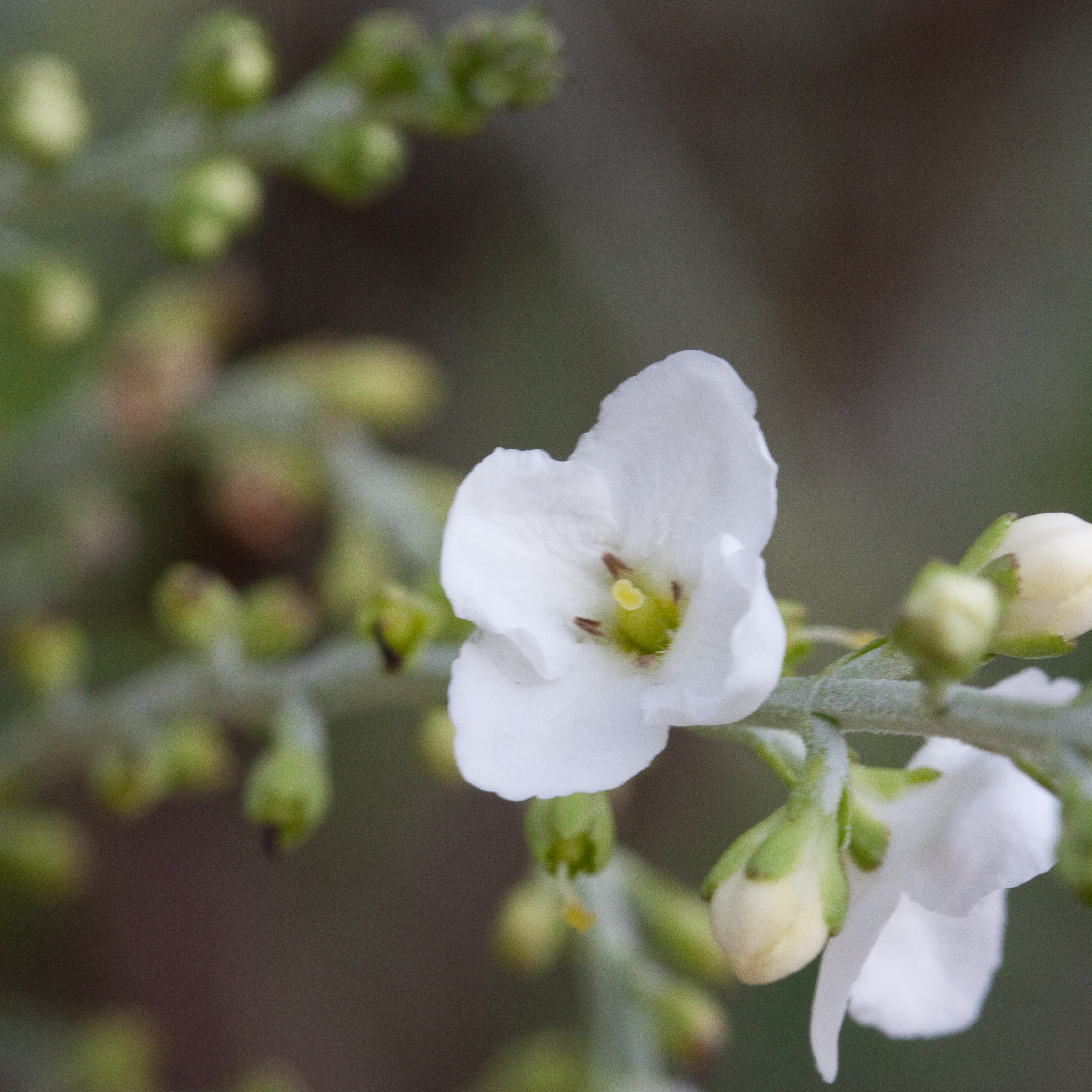 Fleurs de Gomphostigma virgatum - Jardin des Plantes - Paris - France